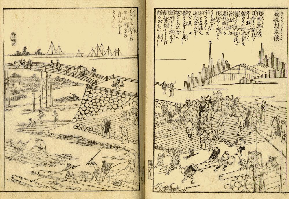 摂津名所図会より長堀材木浜